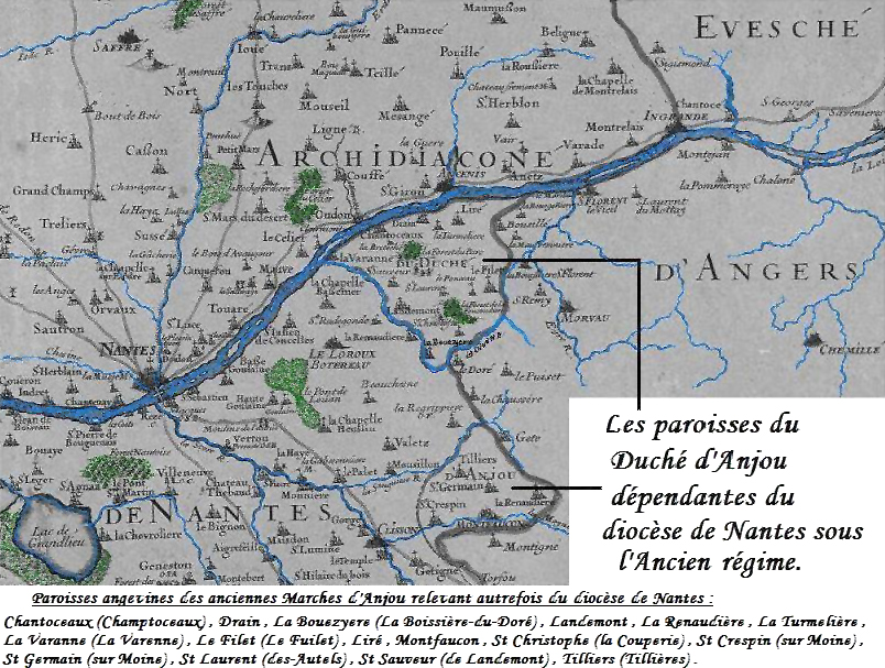 Détails des limites des diocèses de Nantes et d'Angers.